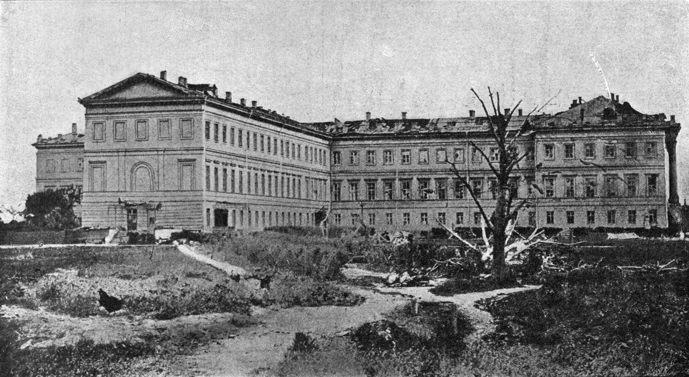 Смерч 1904 года в Москве. I и II кадетские корпуса в Лефортово в Москве